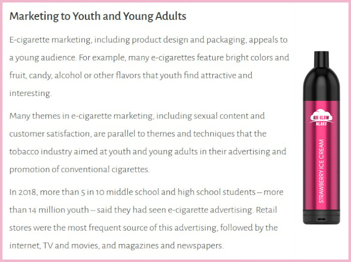 marketing e-papierosów skierowany do dzieci i młodych dorosłych